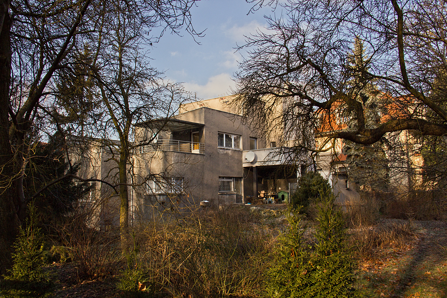 Willa przy ul. Lipińskiego 1 we Wrocławiu widziana od strony ogrodu